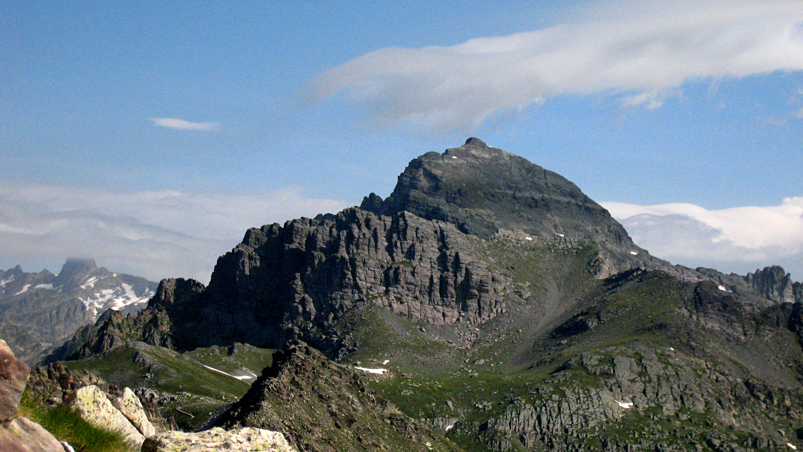 Mont du Grand Capelet 2935 mètres